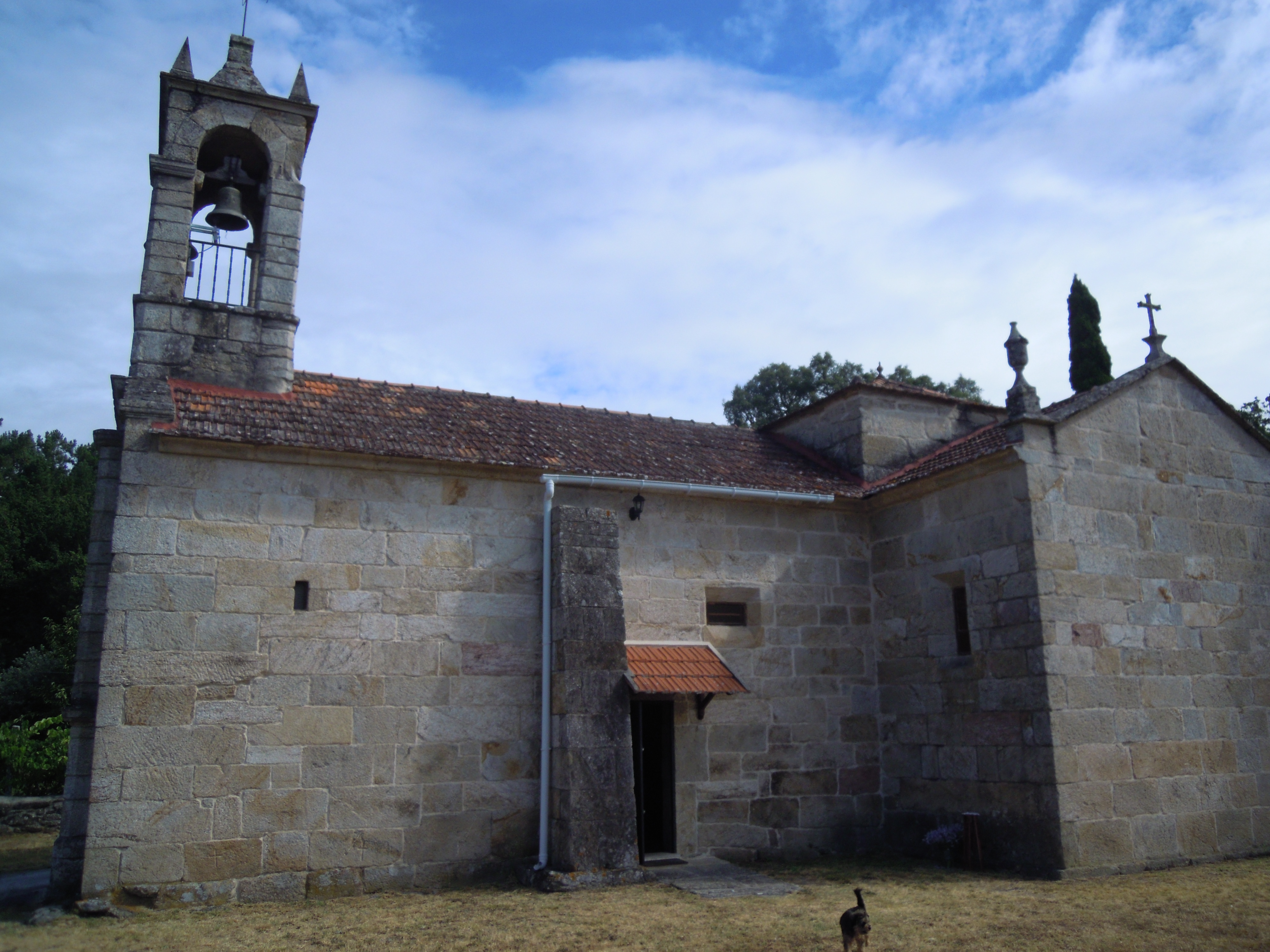 Igrexa de Santa Euxenia de Setados (As Neves)